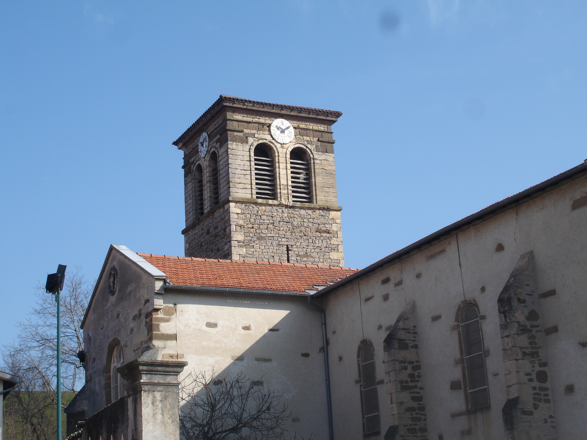 Toussieu (69) : Tour-clocher de l'église